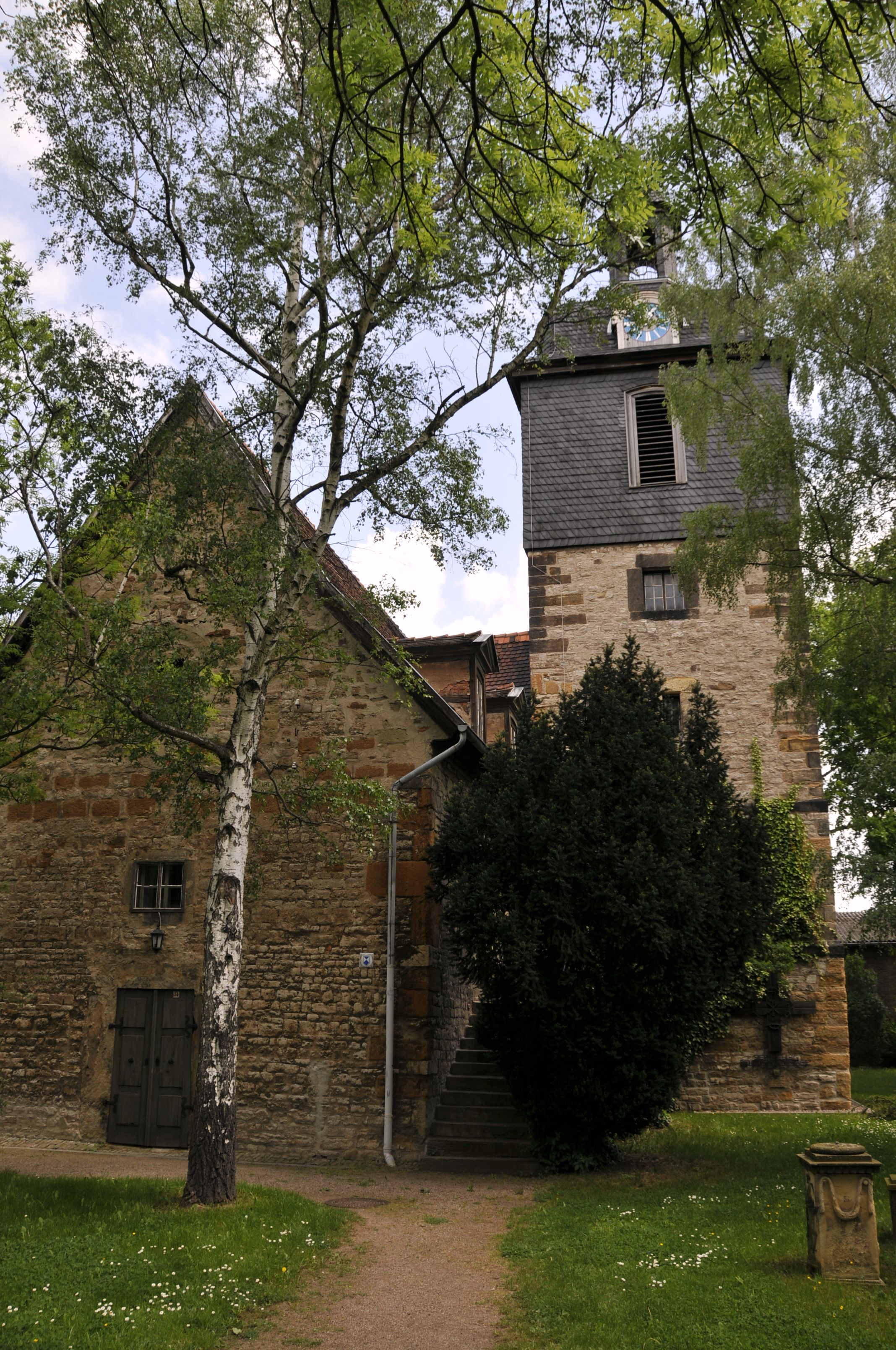 Kirche Ingersleben